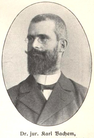 Karl Bachem (1858-1945), Rechtsanwalt und Deutscher Reichstagsabgeordneter (Zentrum)